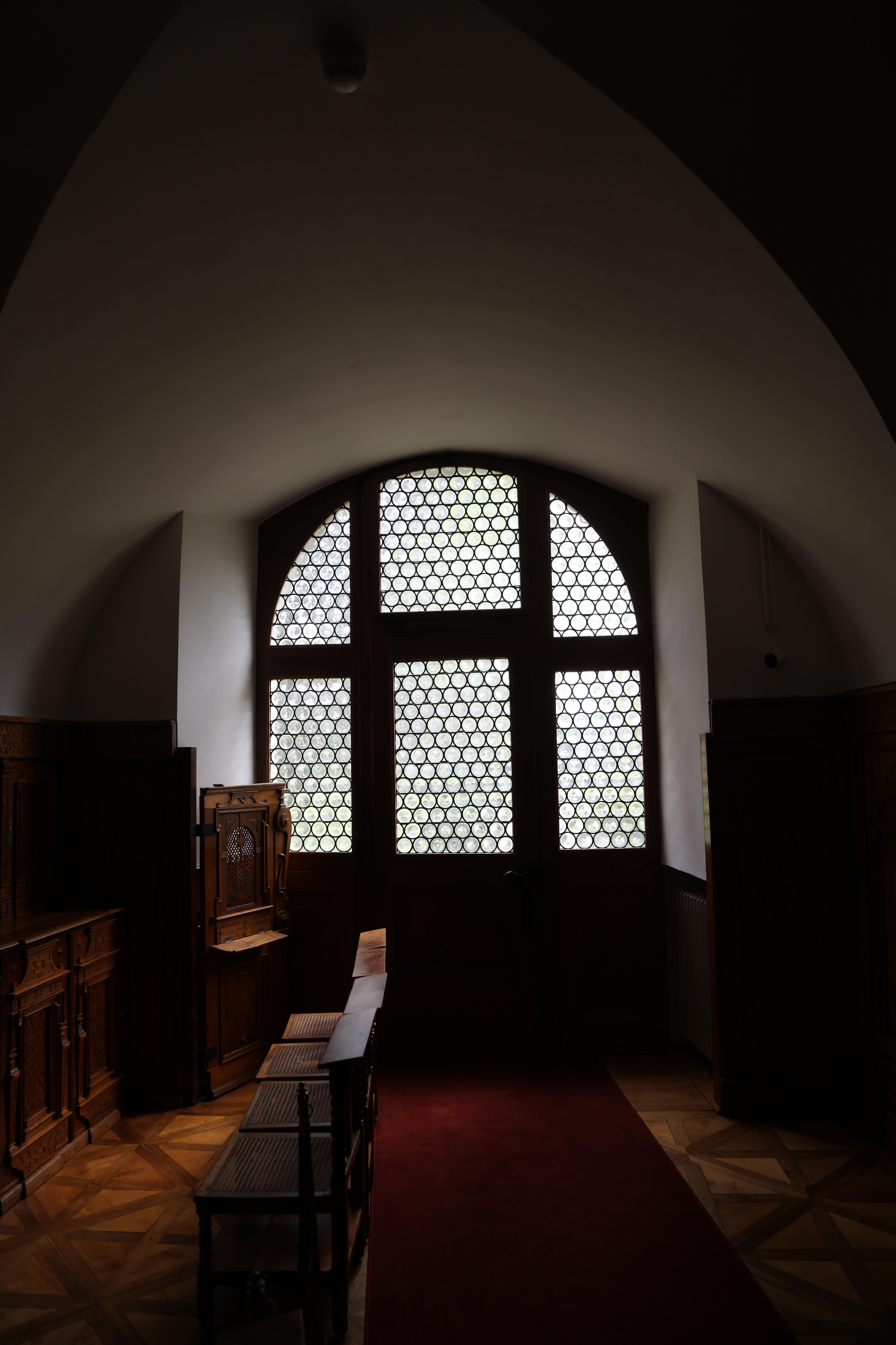 Das Sterbezimmer von Petrus Canisius im damaligen Kollegium der Jesuiten, wurde 1636 zu einer Kapelle umgebaut. Es befindet sich im Erdgeschoss des Mittelbau, des heutige als Kollegium St. Michael bekannten Baus. Die Ausstattung stammt grösstenteils von Hans-Franz Reyff und seinem Atelier.